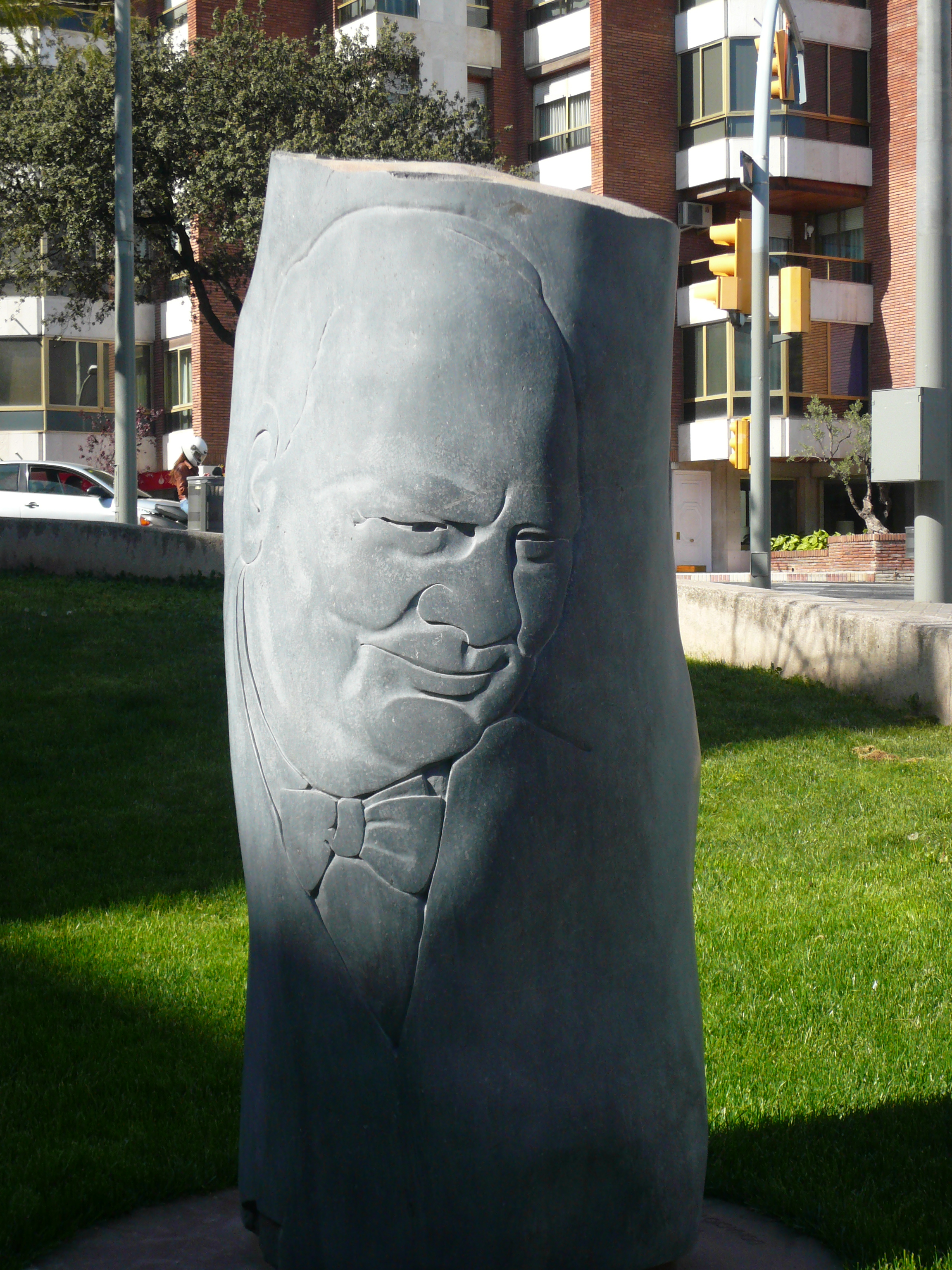 Monument a Winston Churchil, a Via Augusta amb Ronda del General Mitre, a les Tres Torres (Barcelona).